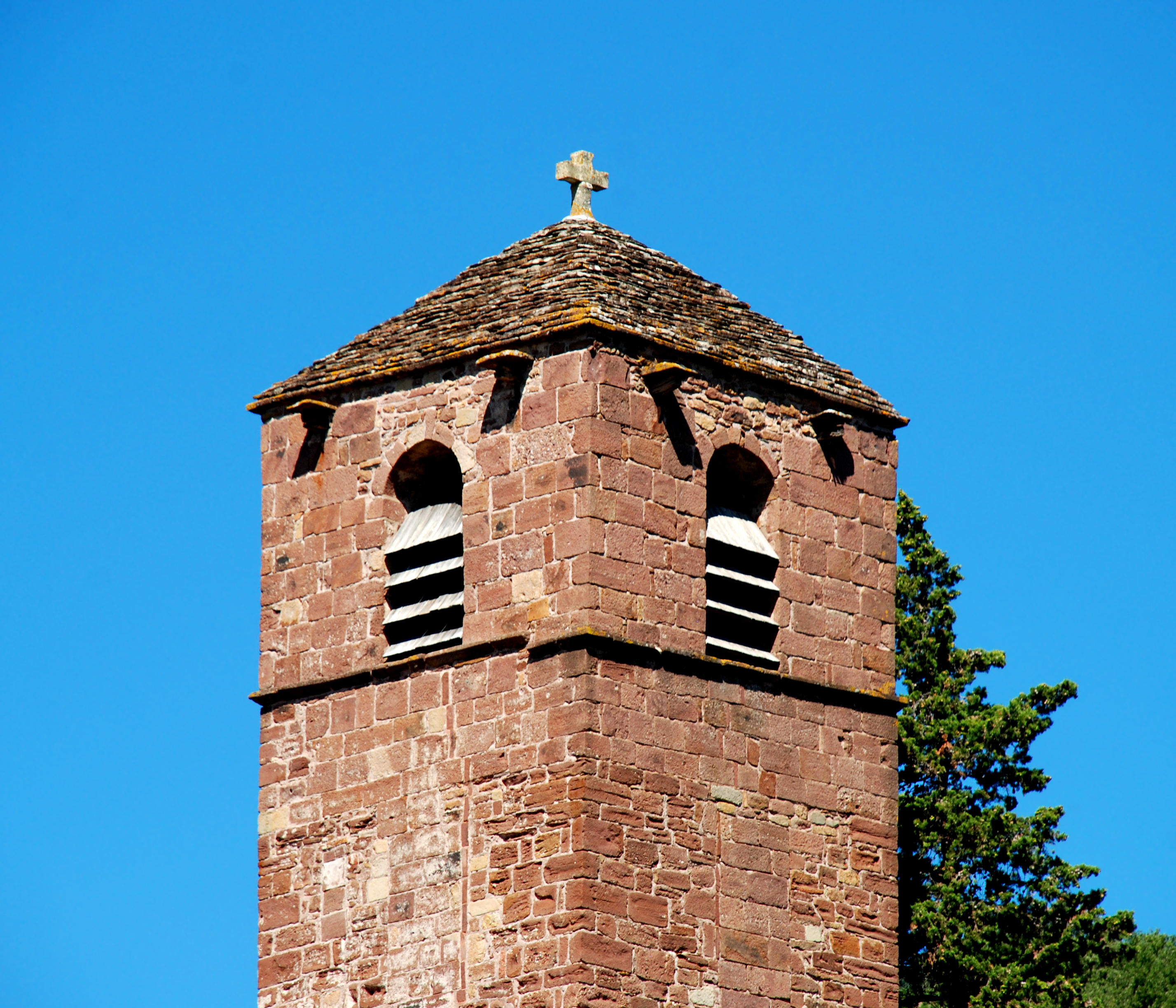 France - Languedoc - Hérault - La Tour-sur-Orb - Église Saint-Cyr et Sainte-Julite de Saint-Xist